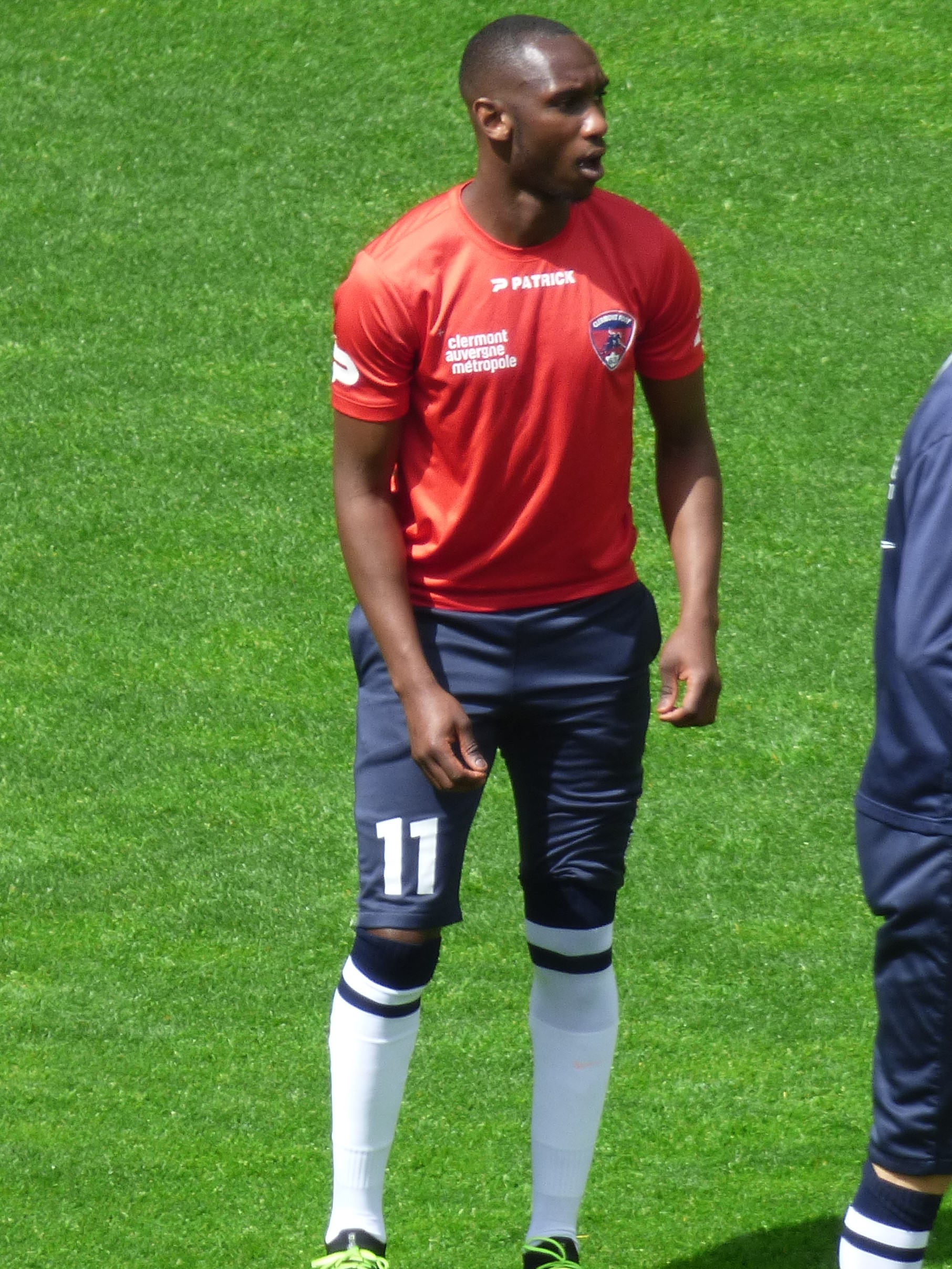 Alassane N'Diaye avant le match RC Lens / Clermont Foot 63, comptant pour la 36ème journée du championnat de France de football de Ligue 2 2018-2019, le 4 mai 2019, au stade Bollaert-Delelis.